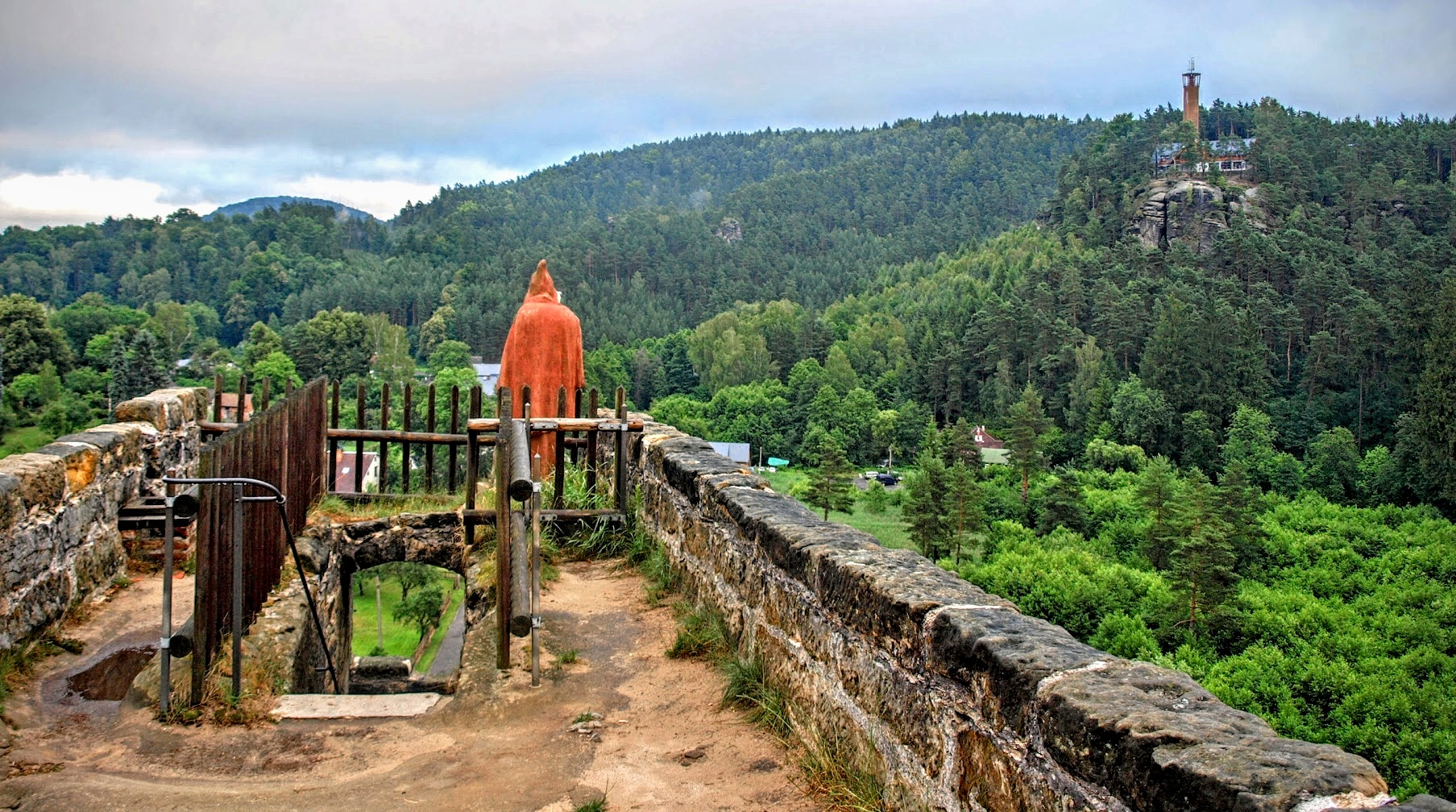 Sloup, skalní hrad